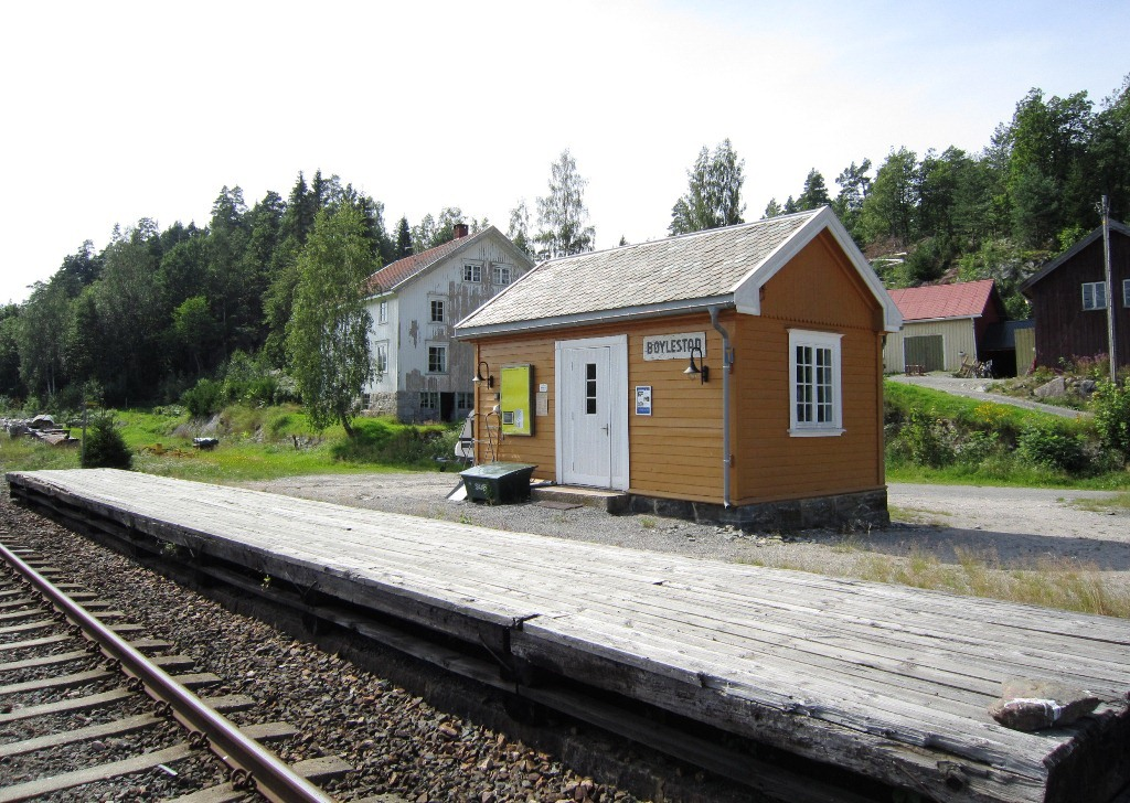 Bøylestad stoppested på Arendalsbanen